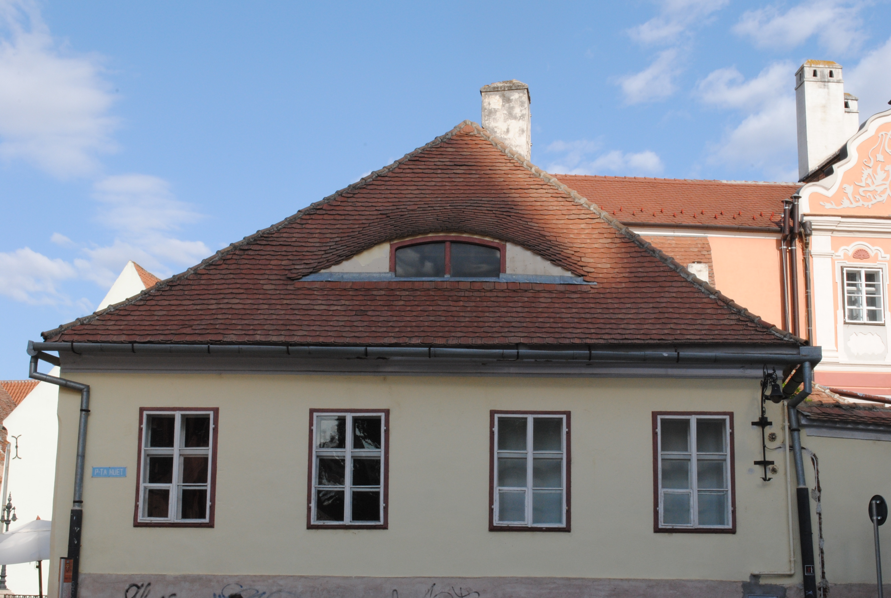 Casă, cu fragment din capela gotică " Sf. Ștefan" sec. XIV - XV,1550 - 1600, 1831